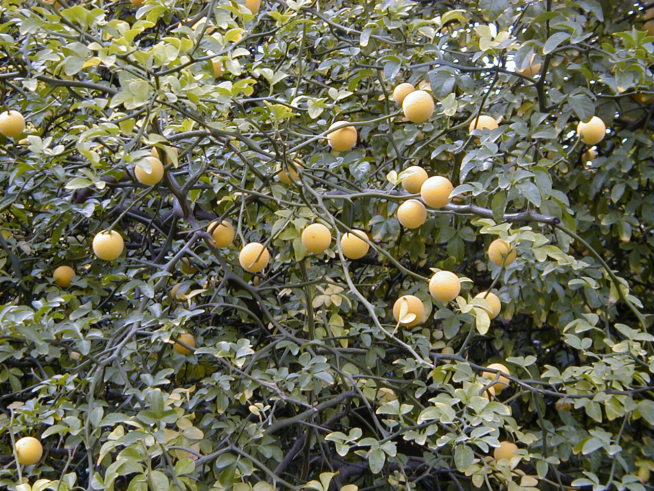 Poncirus trifoliata. Real Jardín Botánico de Madrid.